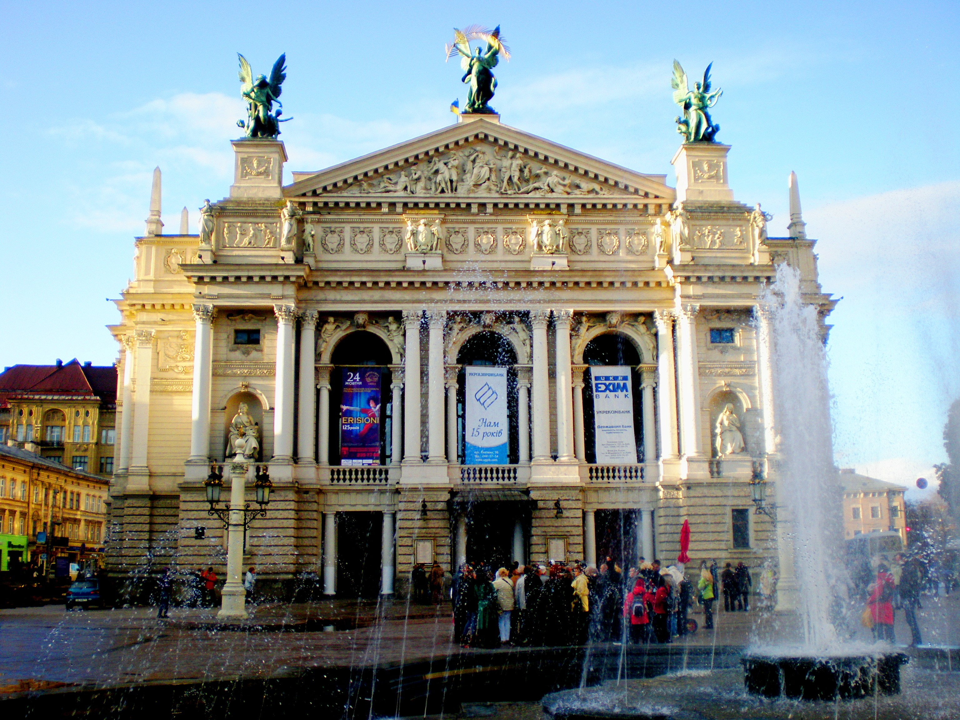 Львівський Національний Академічній театр опери та балету імені Соломії Крушельницької